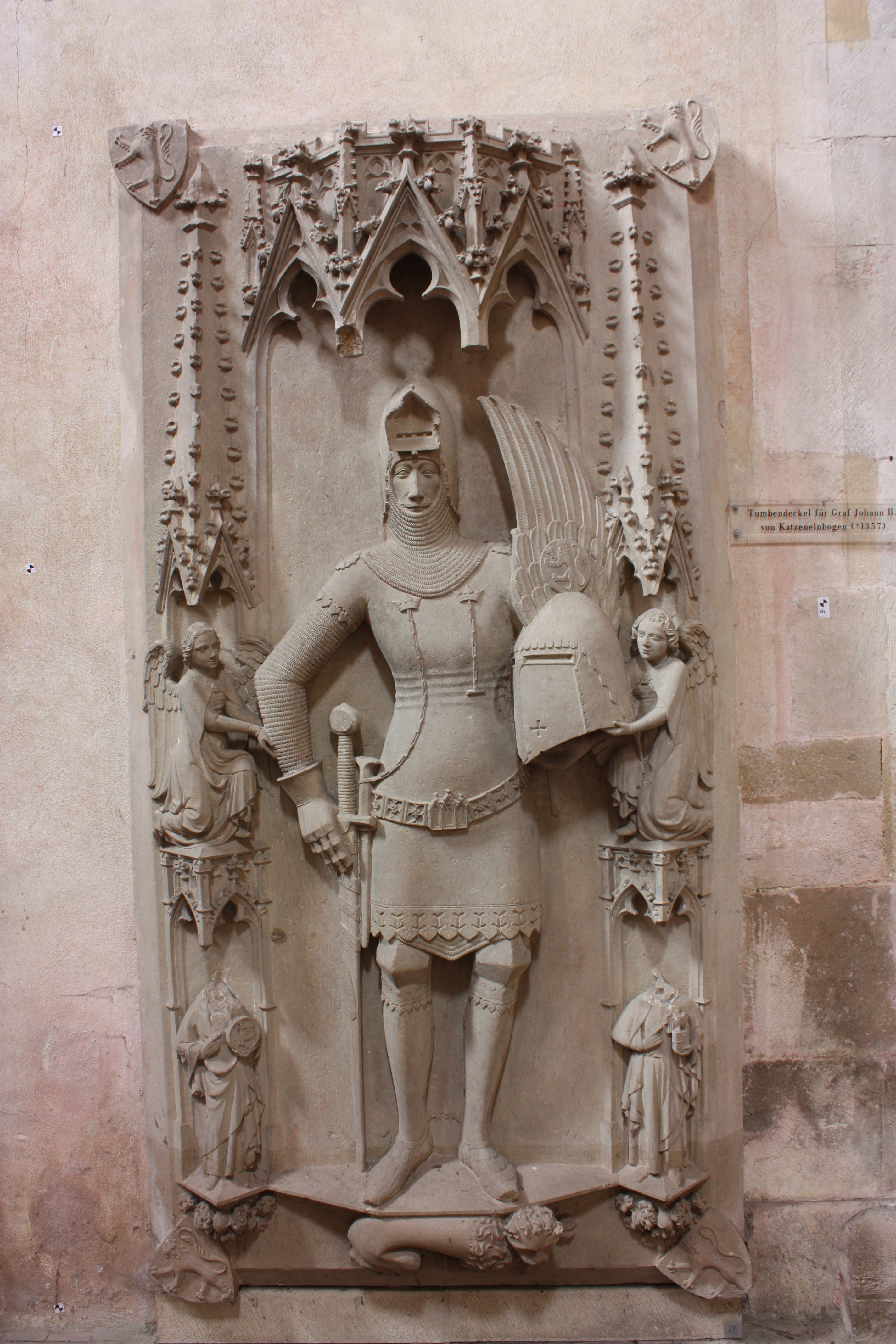 Grabplatte des Grafen Johann II von Katzenelenbogen (Nr. 45) in der Basilika des Kloster Eberbach